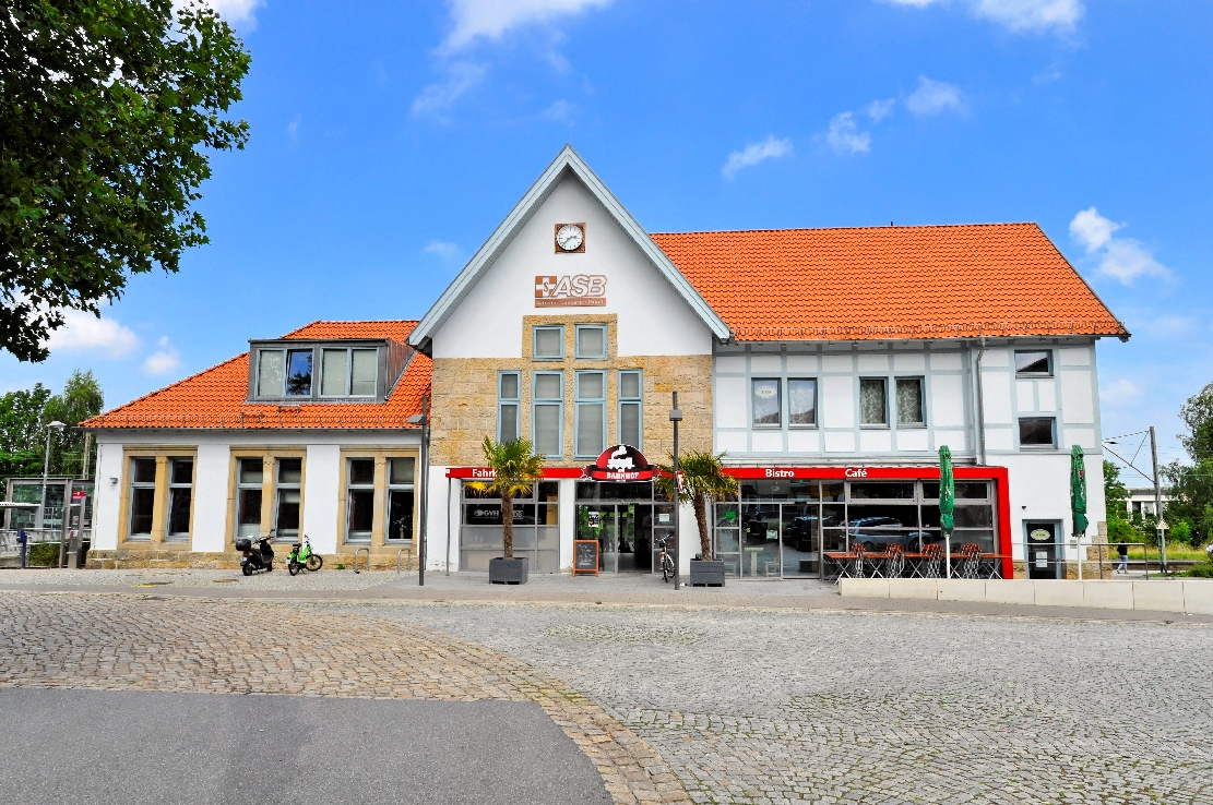 Barsinghausen 2015